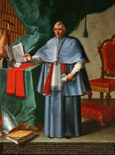 Retrato del eclesiástico español Martín Funes y Lafiguera († 1654), que fue obispo de Albarracín y confesor del rey Felipe IV de España.